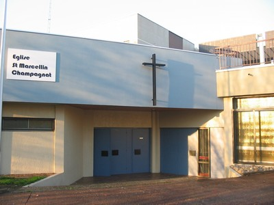 L'église Saint Marcellin Champagnat située dans le quartier de Fonsala à Saint Chamond.